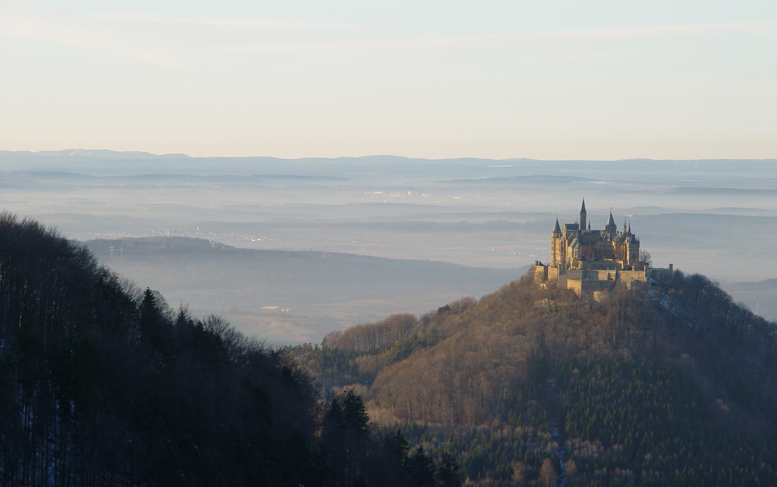 Die Burg Hohenzollern, den Horizont bildet der Schwarzwald mit der Hornisgrinde links